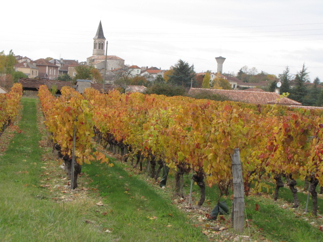 Sauzet (Lot)